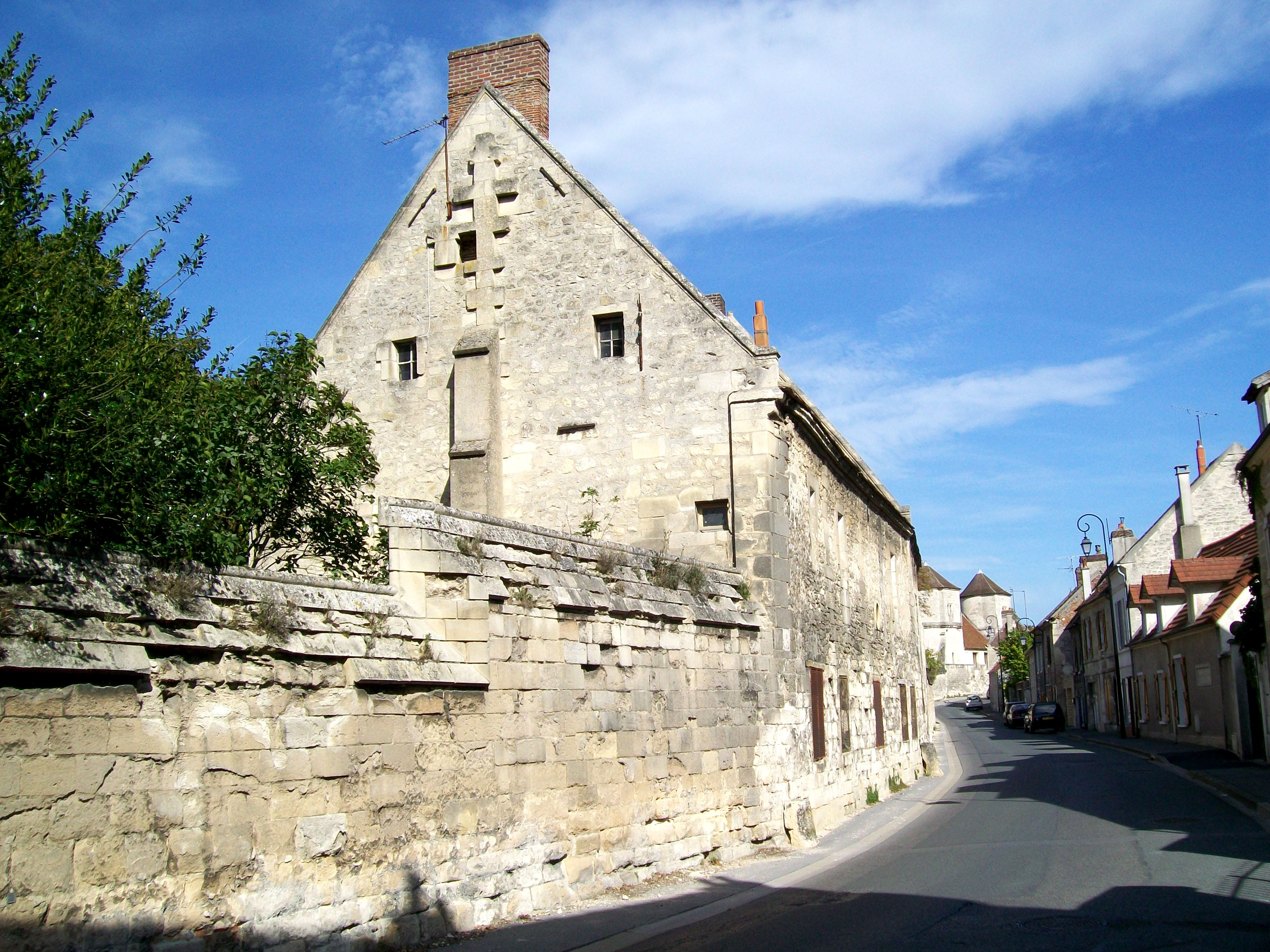 La « maison des Pères », où étaient installés les pères franciscains chargés de lire les messes à l'église abbatiale.